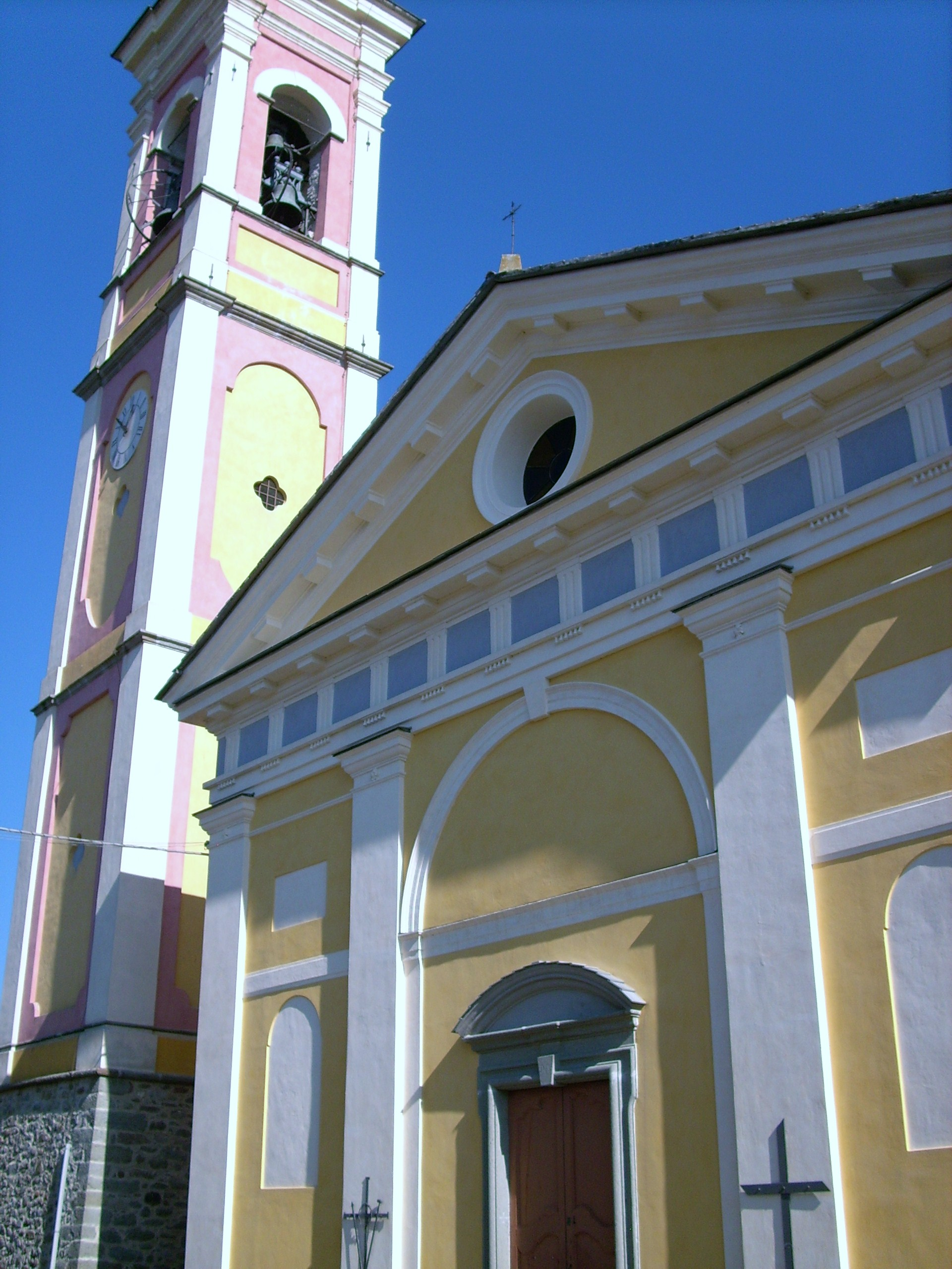 Chiesa di Santa Maria di Roggiano, Sesta Godano, Liguria, Italy